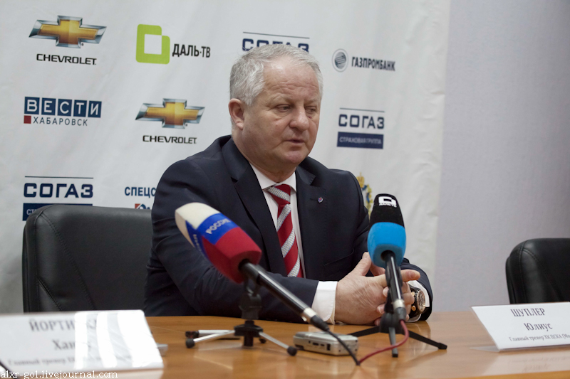 Хоккейный тренер Юлиус Шуплер